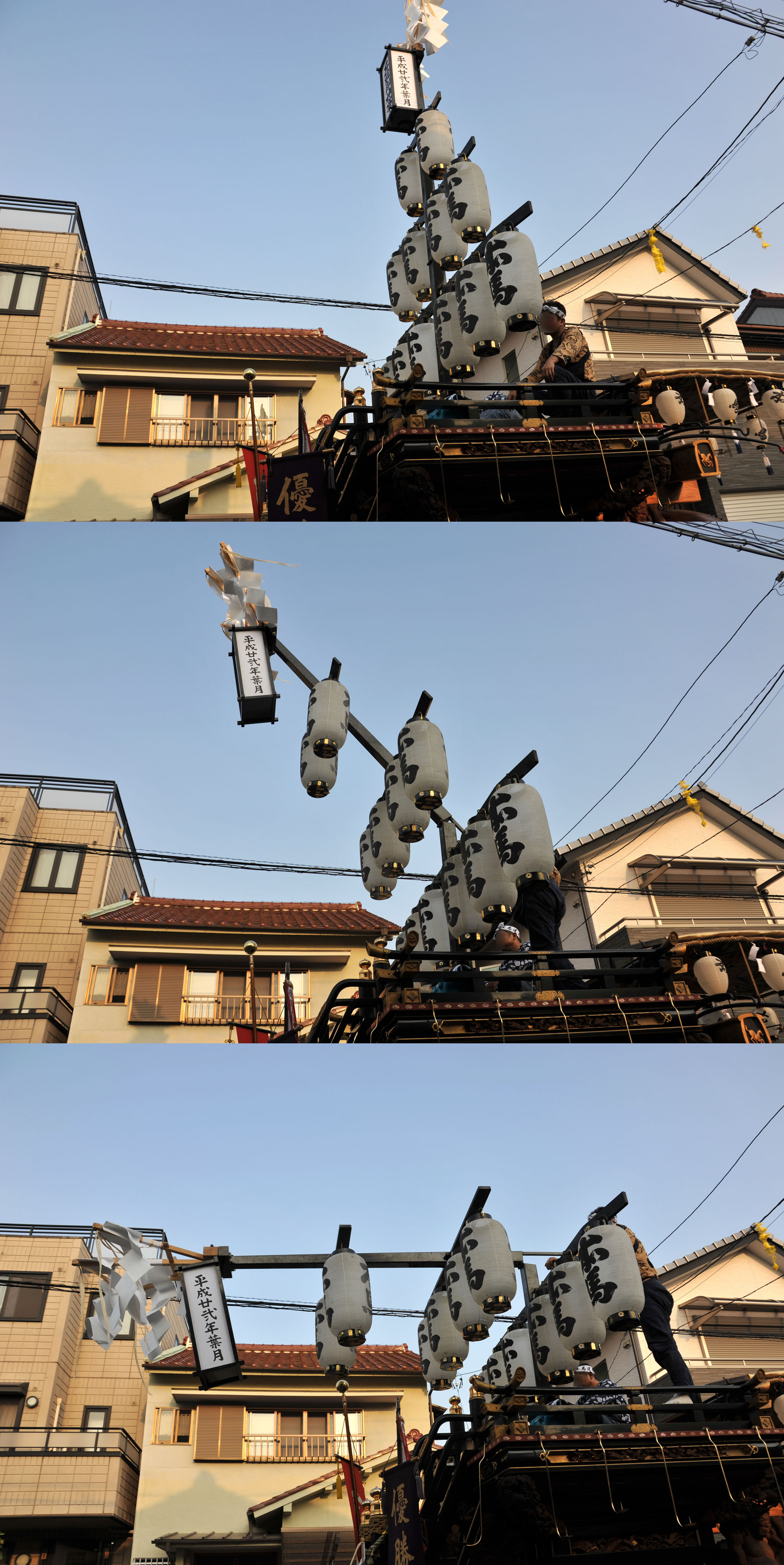 石取祭車における真柱のちょうつがい構造による折れ曲がりの様子。桑名市内にて撮影。